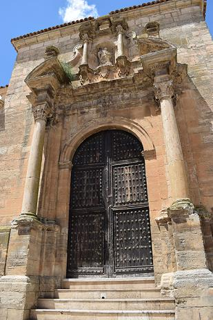 De estilo barroco, data del siglo XVIII.